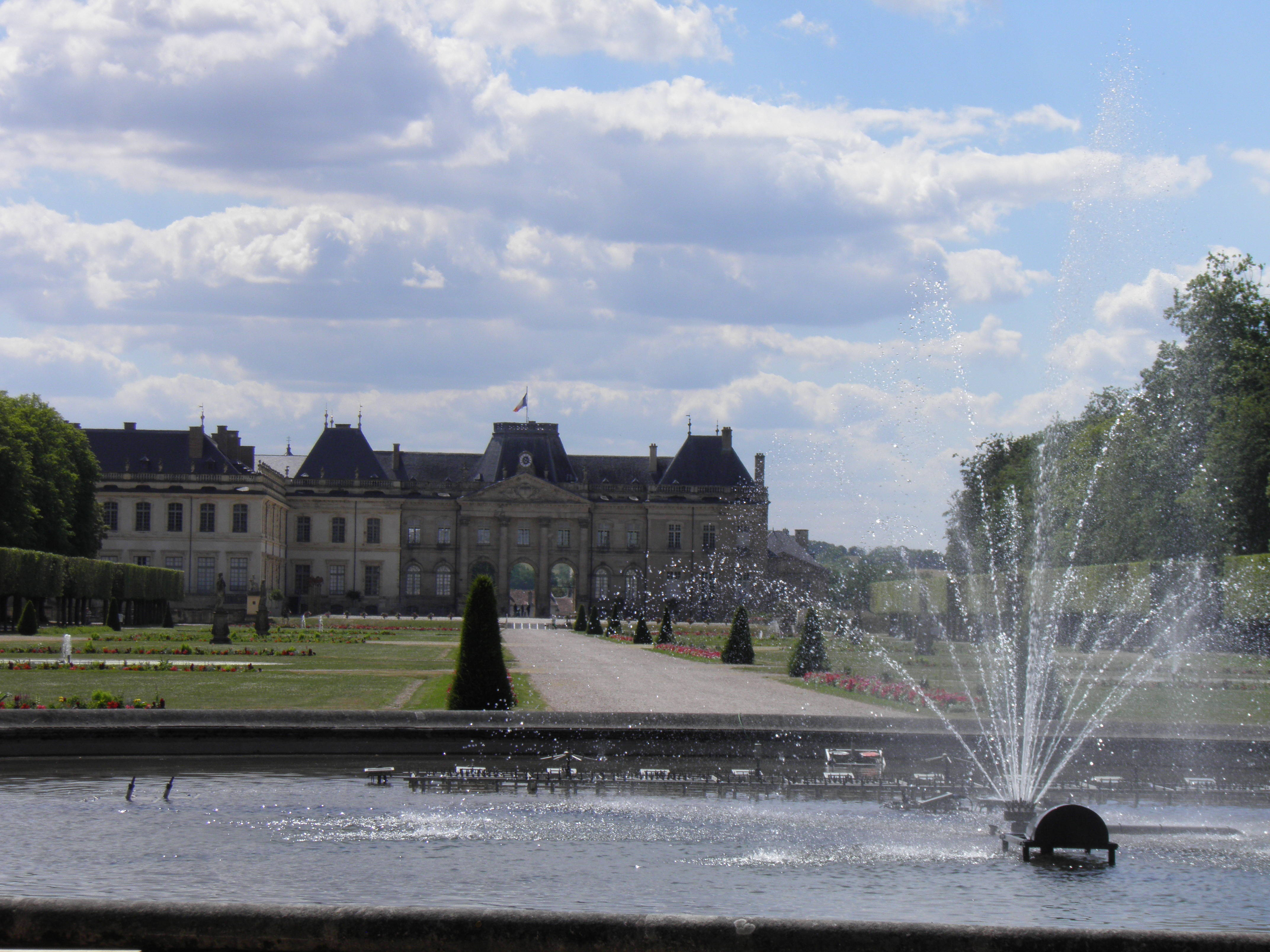 Grand bassin et château de Lunéville (Meurthe-et-Moselle, France).